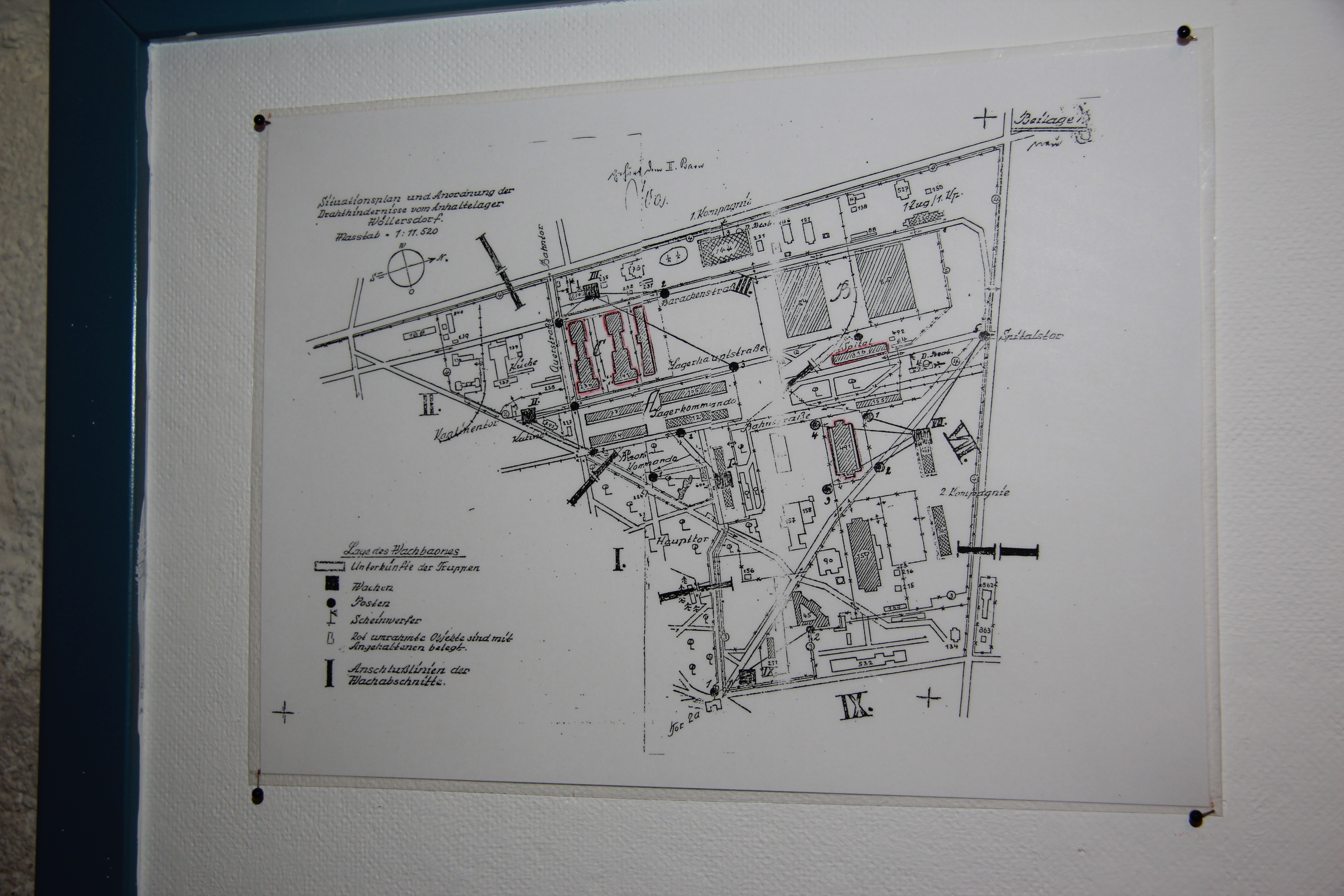 Industrieviertel-Museum in Wiener Neustadt, Niederösterreich - Plan des Anhaltelagers Wöllesdorf